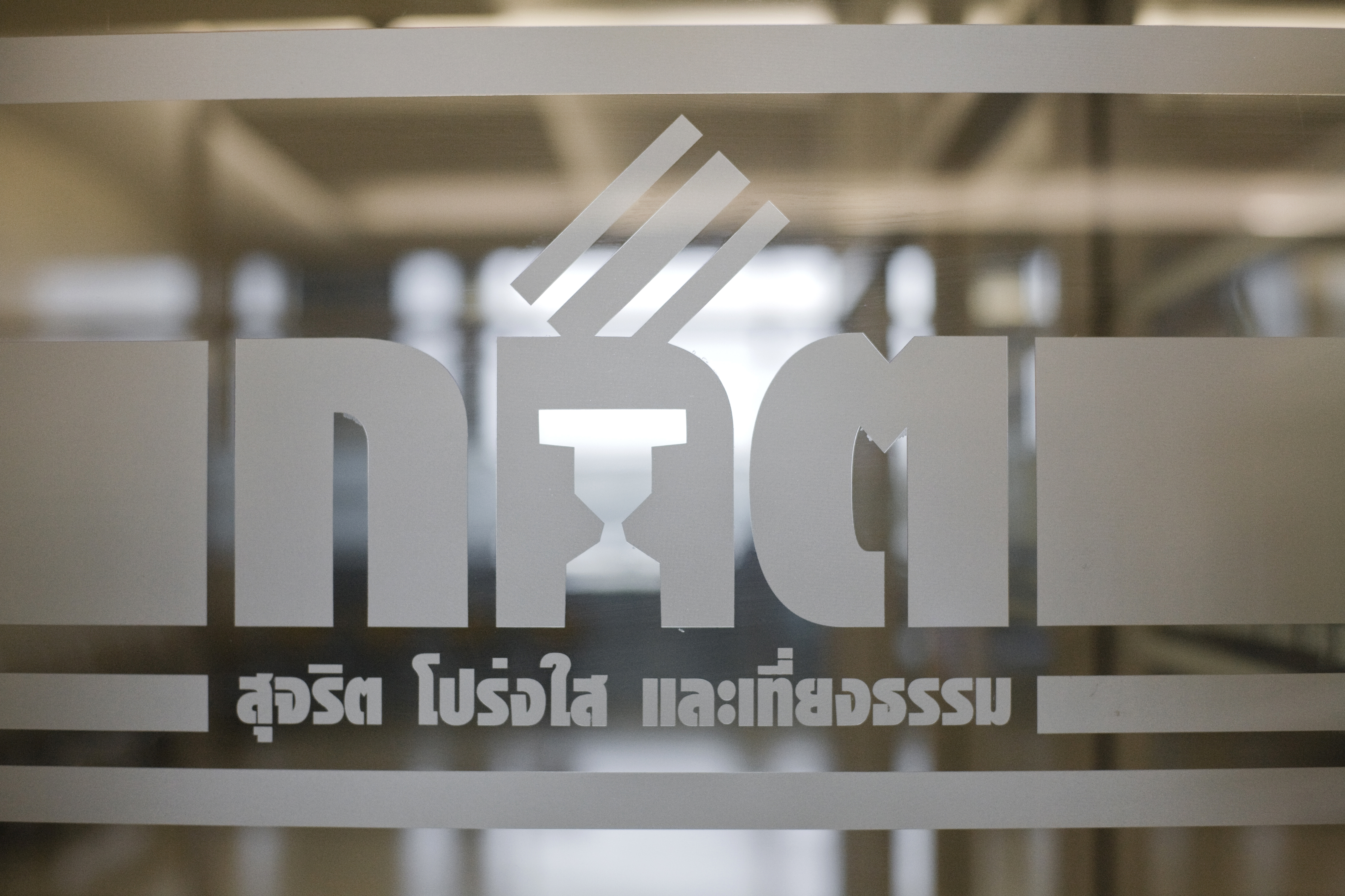 นายกรัฐมนตรี เดินทางพบ กกต. ณ ศูนย์ราชการ แจ้งวัฒนะ วันศุกร์ที่ 8 เมษายน พ.ศ.2554 (Photographer attached to the Prime Minister of the Kingdom of Thailand (H.E.Mr.Abhisit Vejjajiva) : Peerapat Wimolrungkarat / พีรพัฒน์ วิมลรังครัตน์) @is50mm